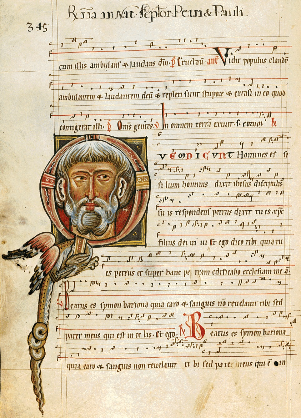 Sedlecký antifonář - česká jacentní chorální notace (Rombika)